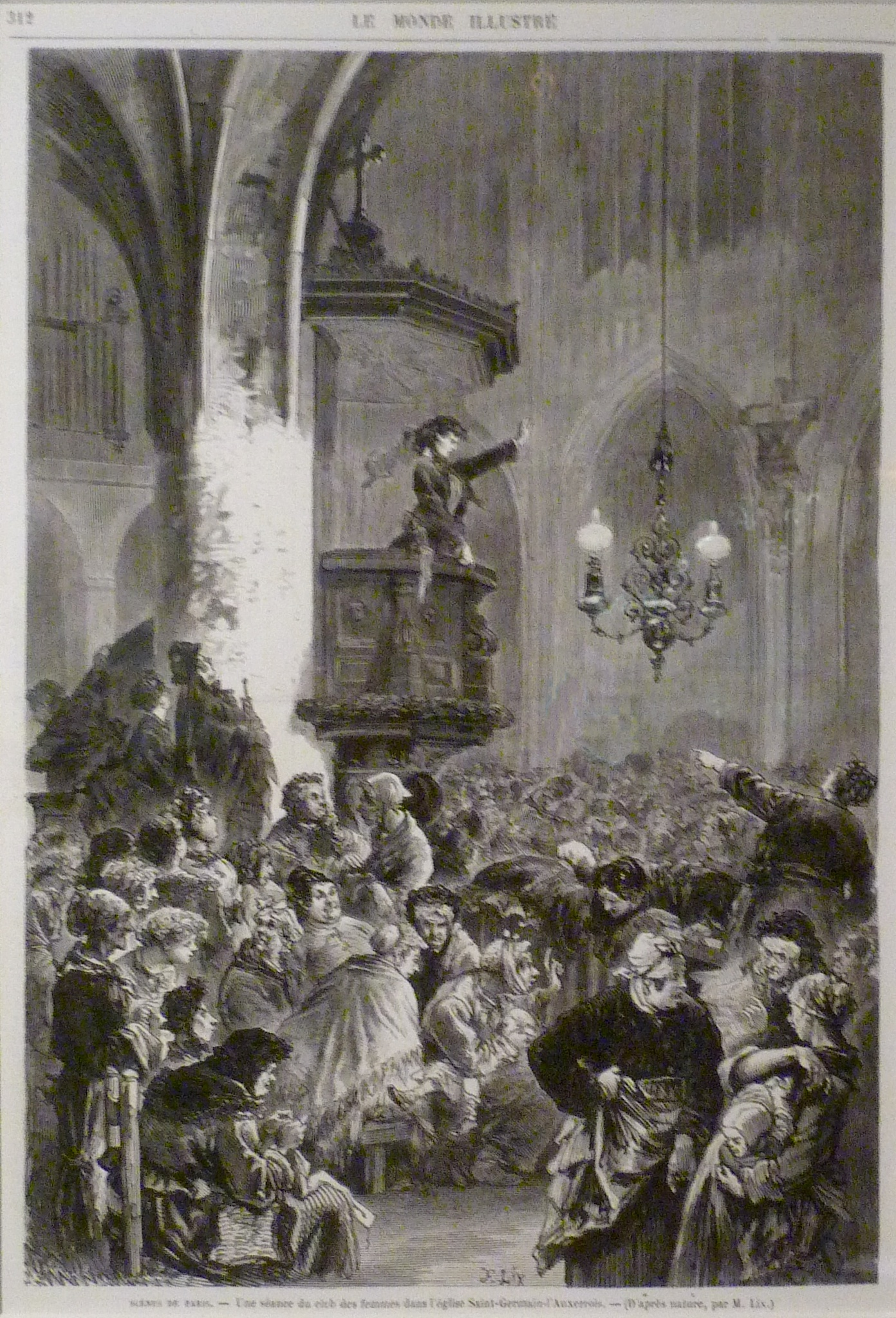 Exposition La Commune de Paris à l'Hôtel de Ville de Paris (18 mars - 28 mai 2011) - Une séance du Club des Femmes dans l'église Saint-Germain-l'Auxerois - Gravure de Frédéric Lix pour Le Monde illustré du 20 mai 1871 - Bibliothèque historique de la Ville de Paris.